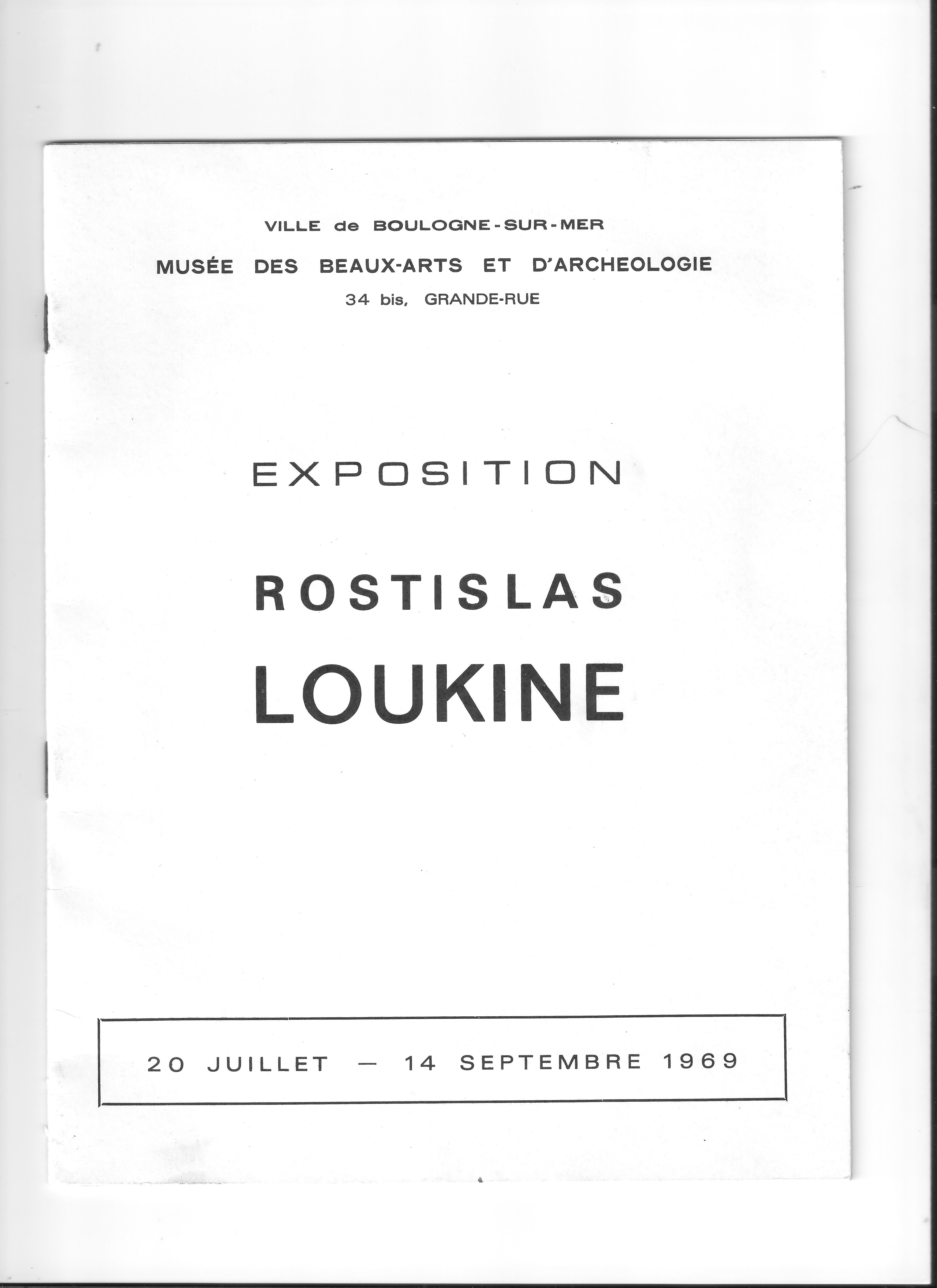 Catalogue de l'exposition organisée par la Ville de Boulogne sur Mer et le Musée des Beaux-Arts et d'Archéologie e